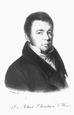 Johann Christian Moieri portree